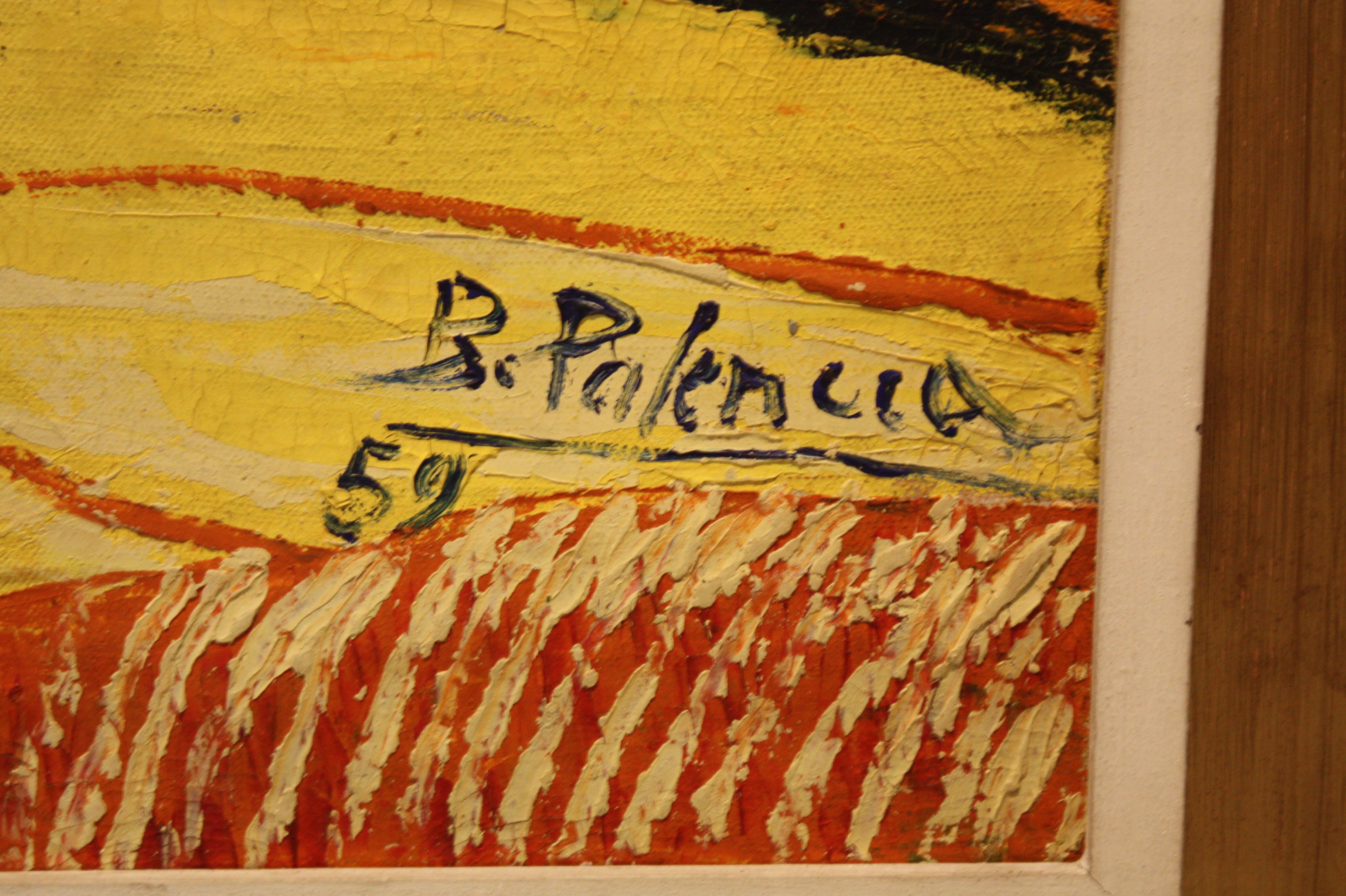 Sinatura de Benjamín Palencia, nun cadro exposto no Museo de Pontevedra (1959)